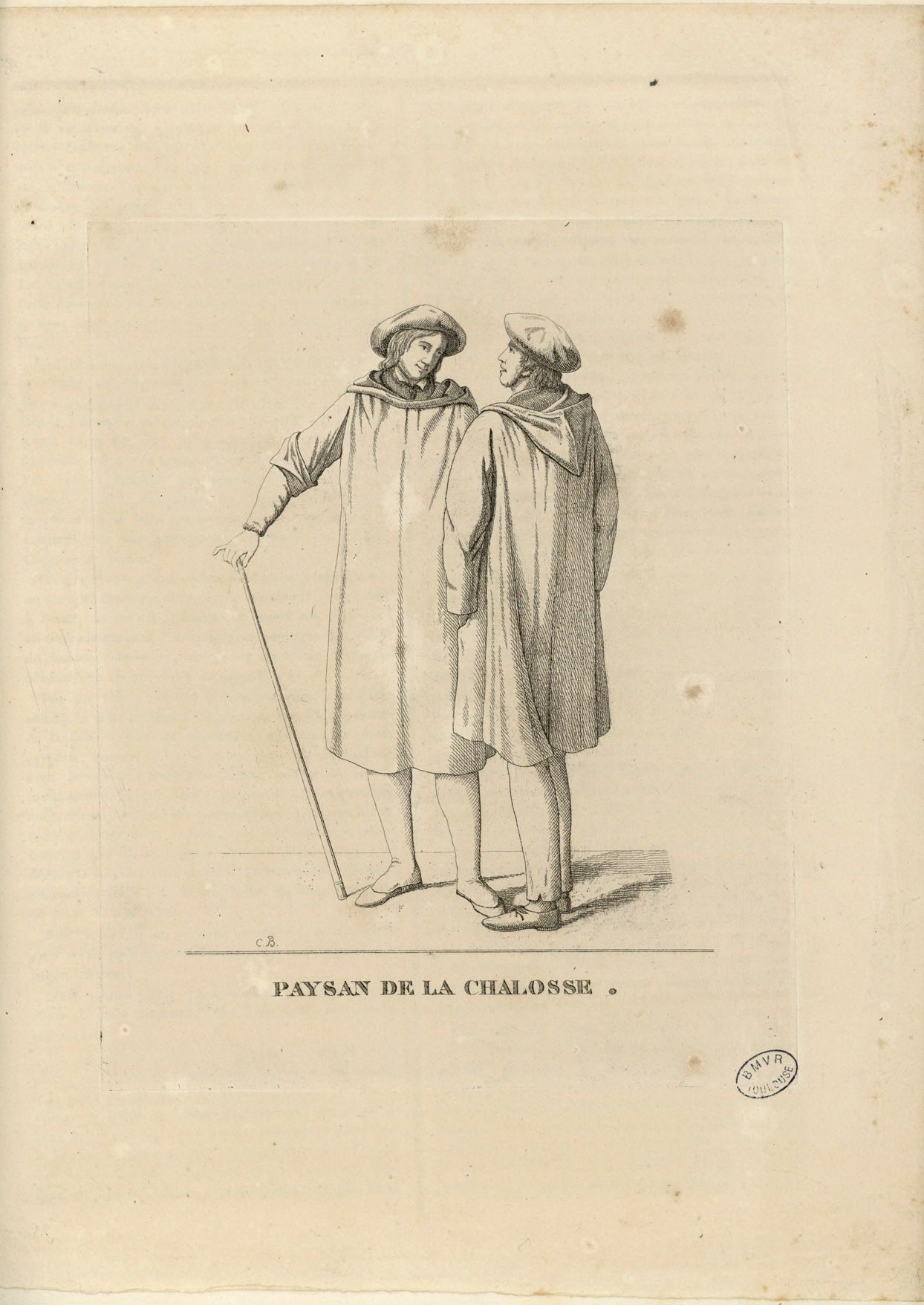 Fait partie d'un recueil des 36 premiers numéros du Pélerin, chaque numéro étant accompagné d'une gravure Ancely, René (1876 - 1966). Possesseur